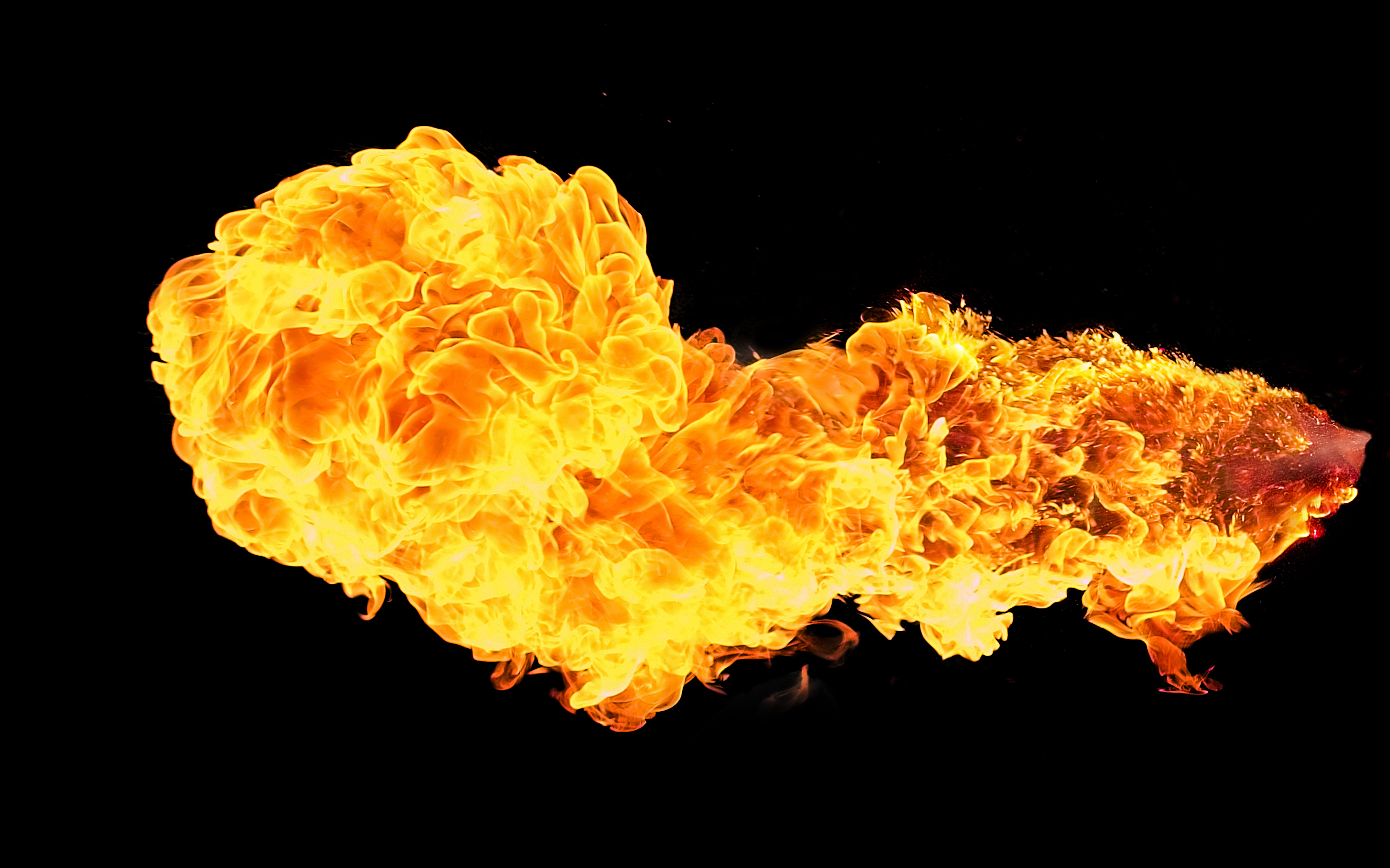 Fire flame